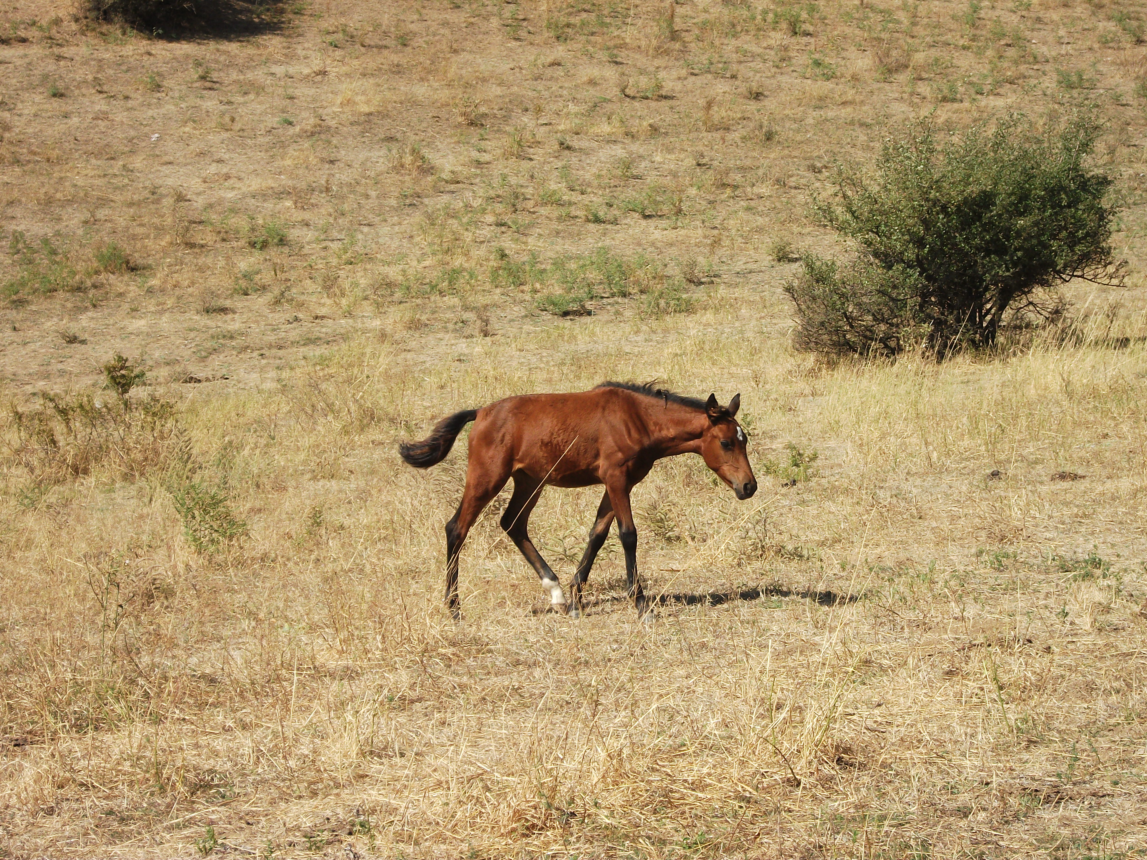 Жеребёнок на плато у Чарвакского водохранилища (Узбекистан)